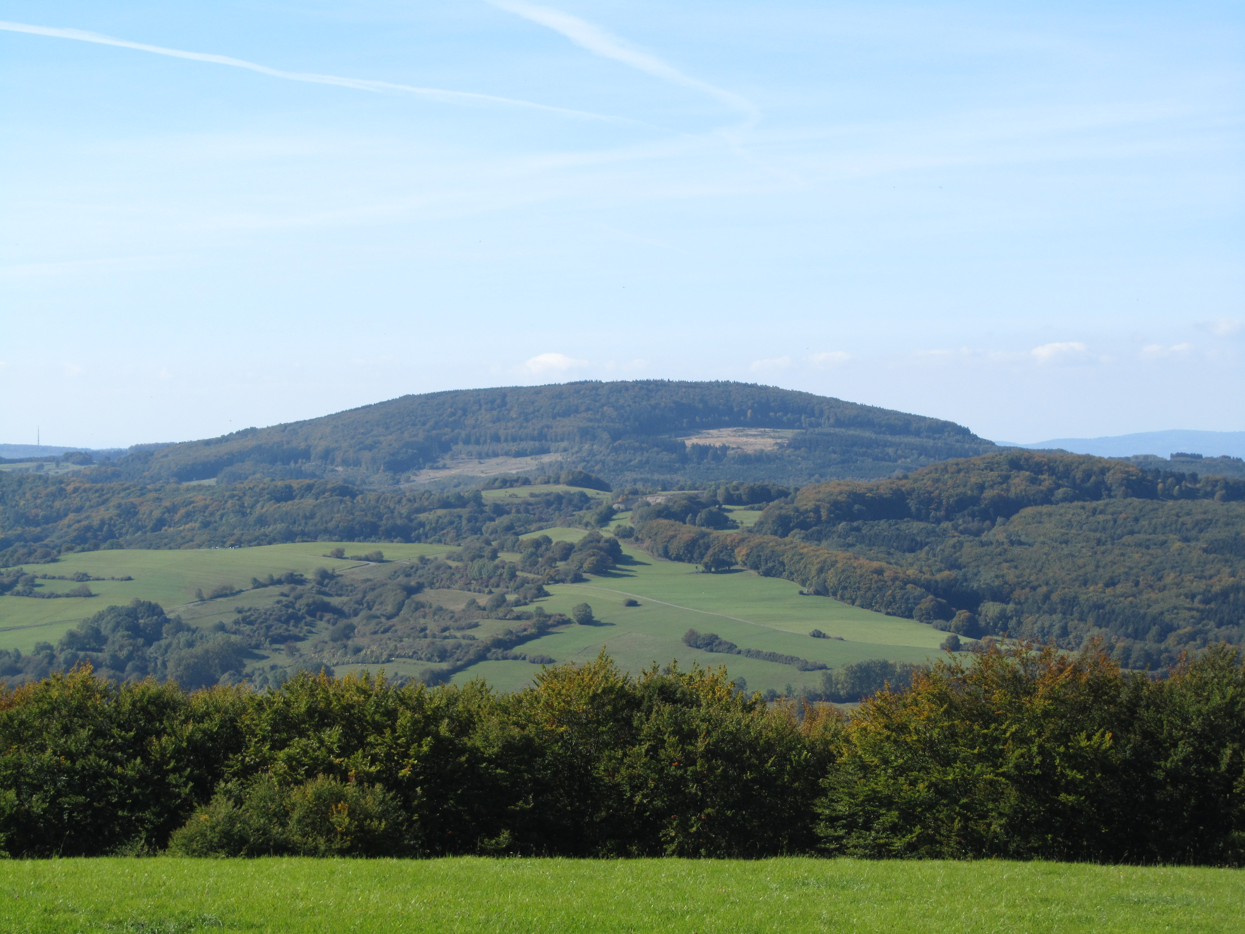 Blick vom Heiligenberg: Der Hirschberg im Kaufunger Wald von Osten